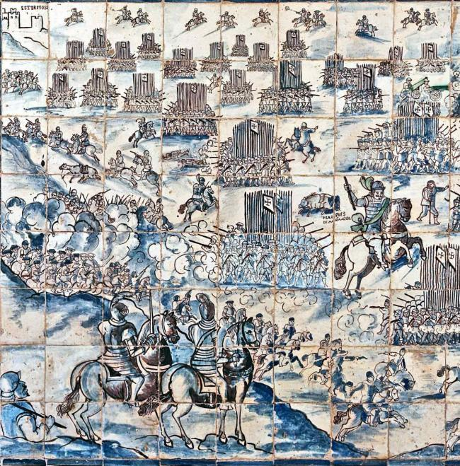 Painel de azulejos Desenho de engenheiro militar ao serviço de Portugal (?).